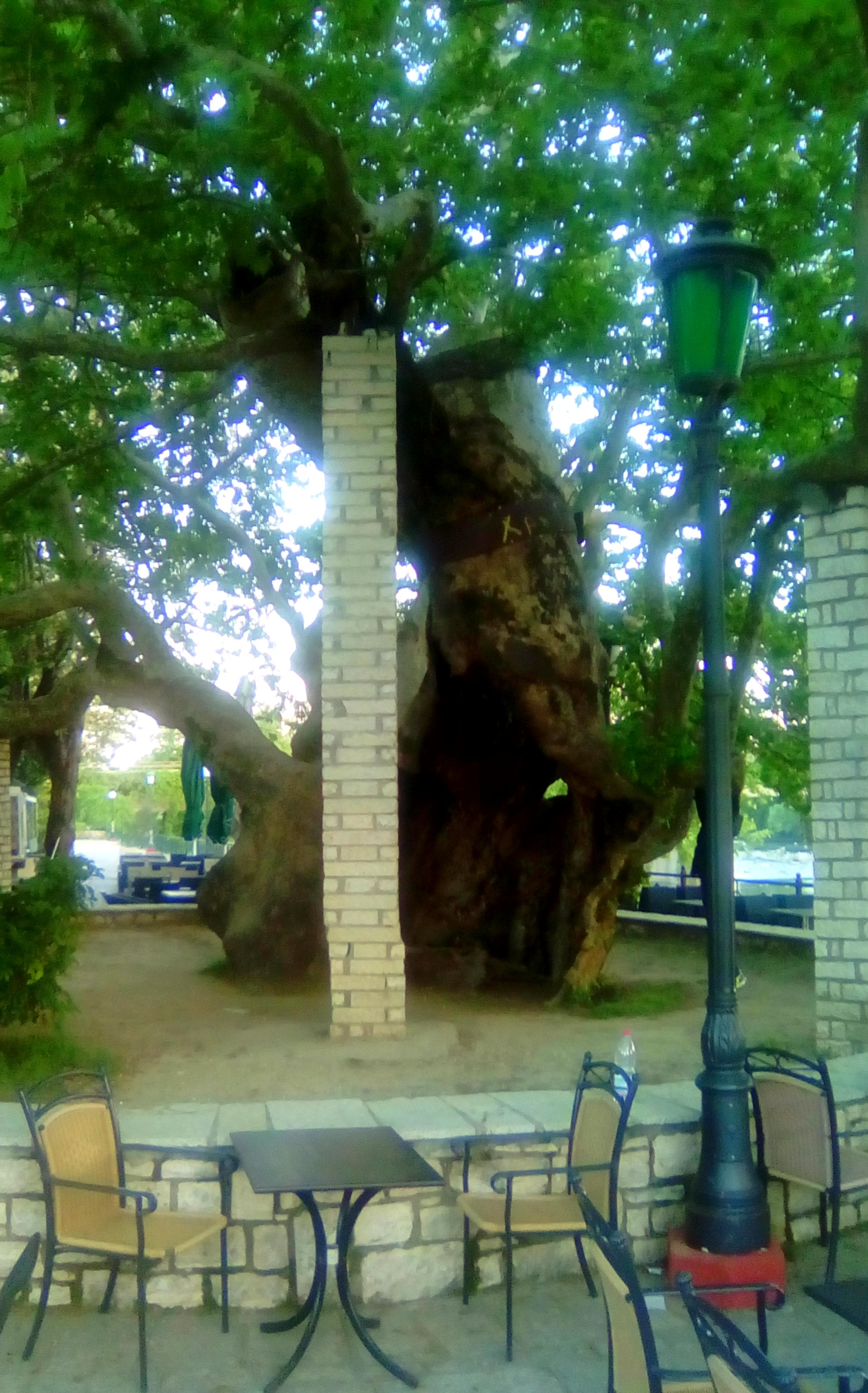 Ο Πλάτανος της Άρτας, δίπλα στο ιστορικό γεφύρι.